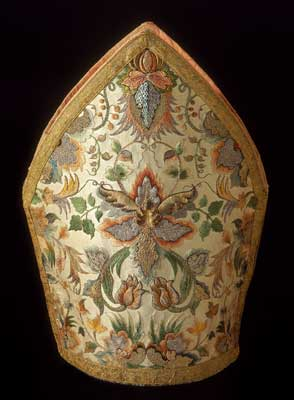 Mijter Bisschop in een museum.